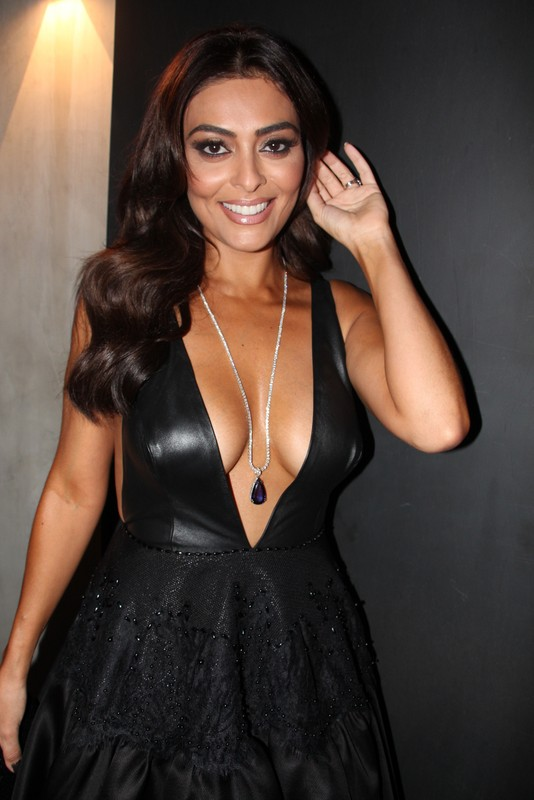 7 - Juliana Paes-001